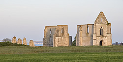 Les ruines de l'Abbaye Notre Dame de Ré dite des chatelliers - La Flotte - Île de Ré Photo issue de ma banque d'images personnelle